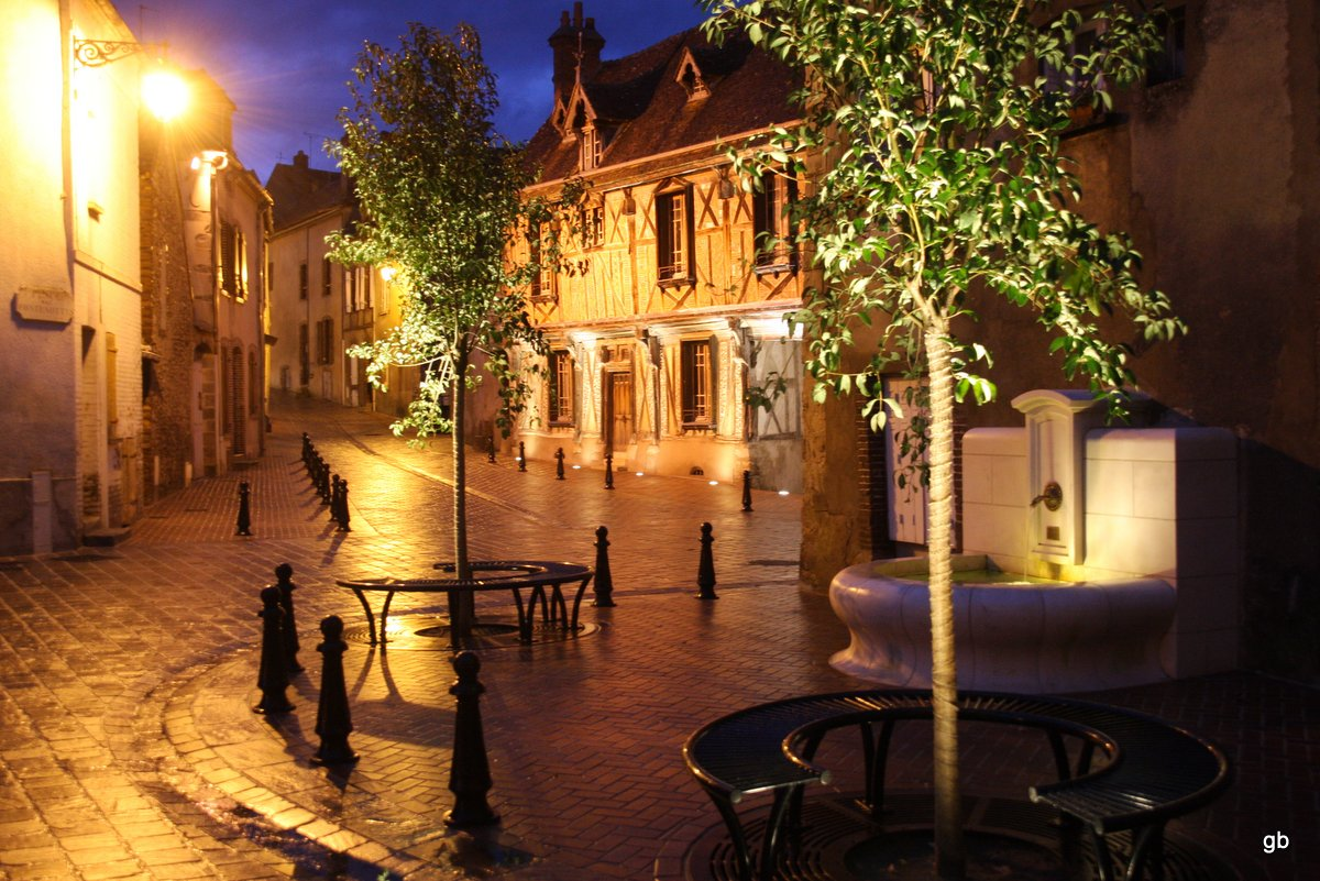 la nuit — la place du four, la fontaine des fontenottes et la maison de l’Archevêché à Saint-Julien-du-Sault (réalisation 2012).